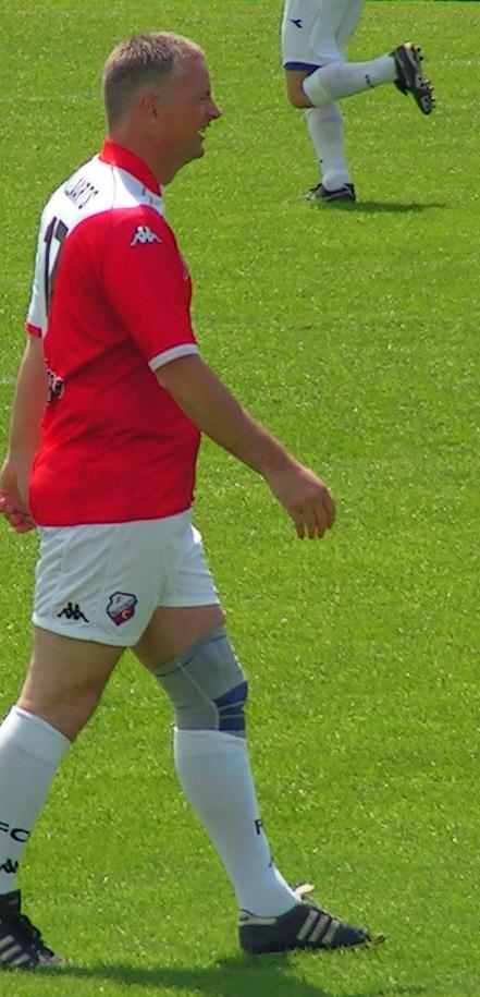 Nederlands voetballer Erik Willaarts in het tenue van FC Utrecht